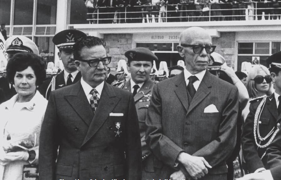 Salvador Allende acompañado de Velasco Ibarra en su visita a Ecuador, 1971